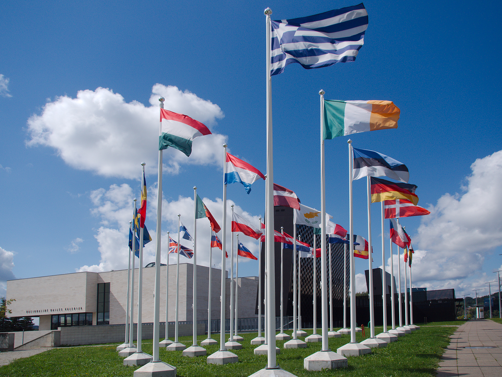 Near Europa Square in Vilnius